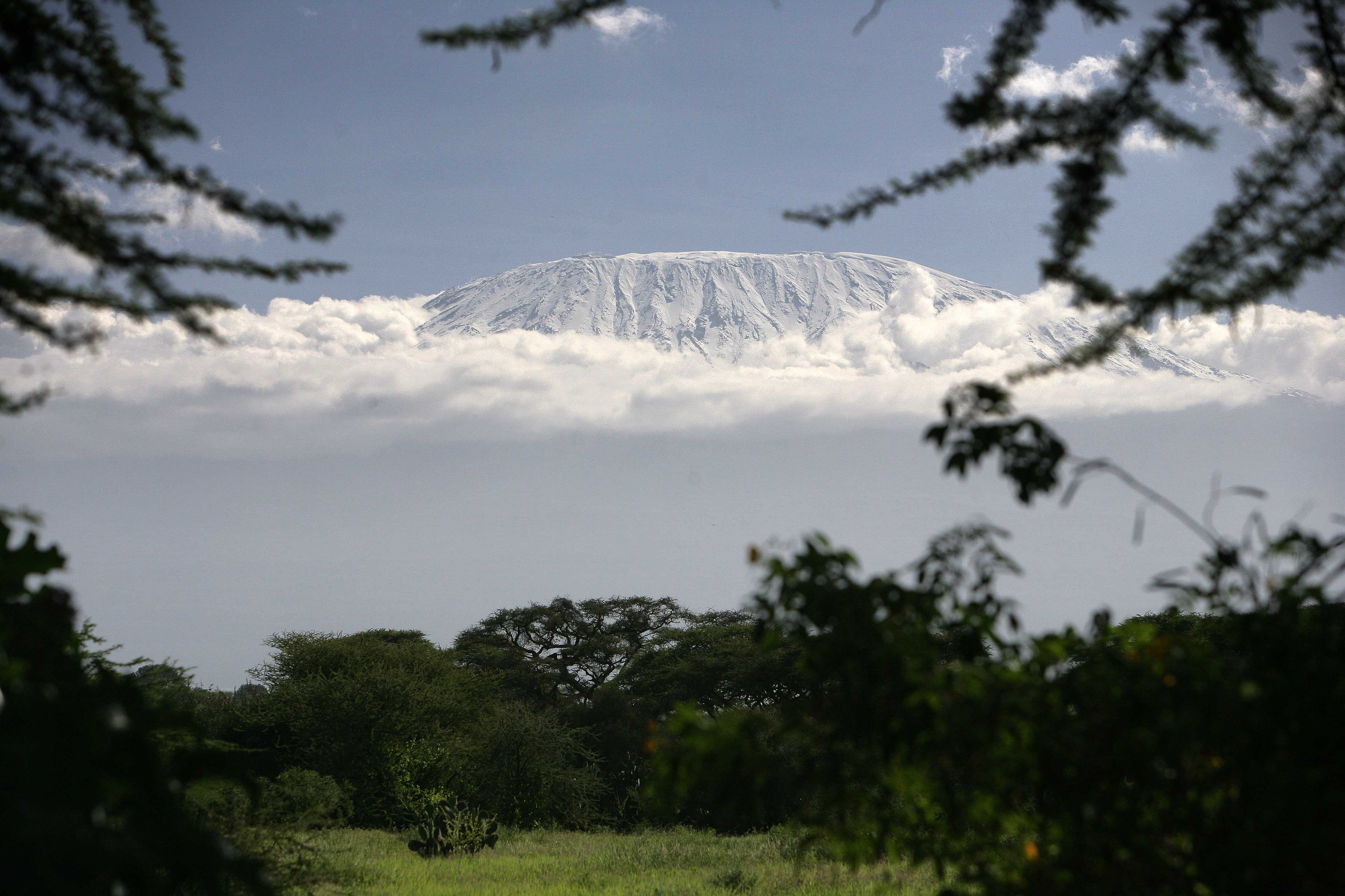 Widok na Kilimandżaro od strony Kenii fot.: Cezary Piwowarski